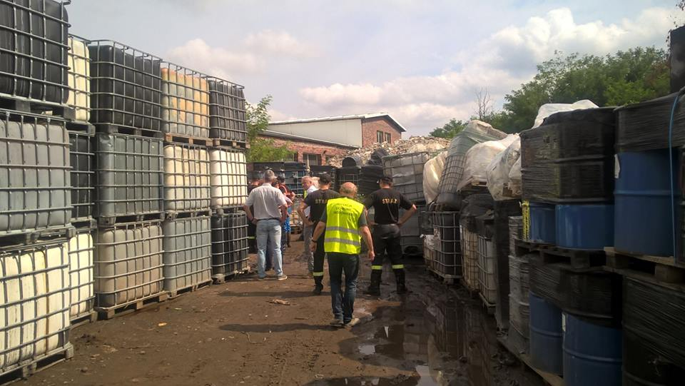 Wizja inspektorów Lubuskiego WIOŚ na nielegalnym składowisku odpadów niebezpiecznych w Wiechlicach gm. Szprotawa 2017